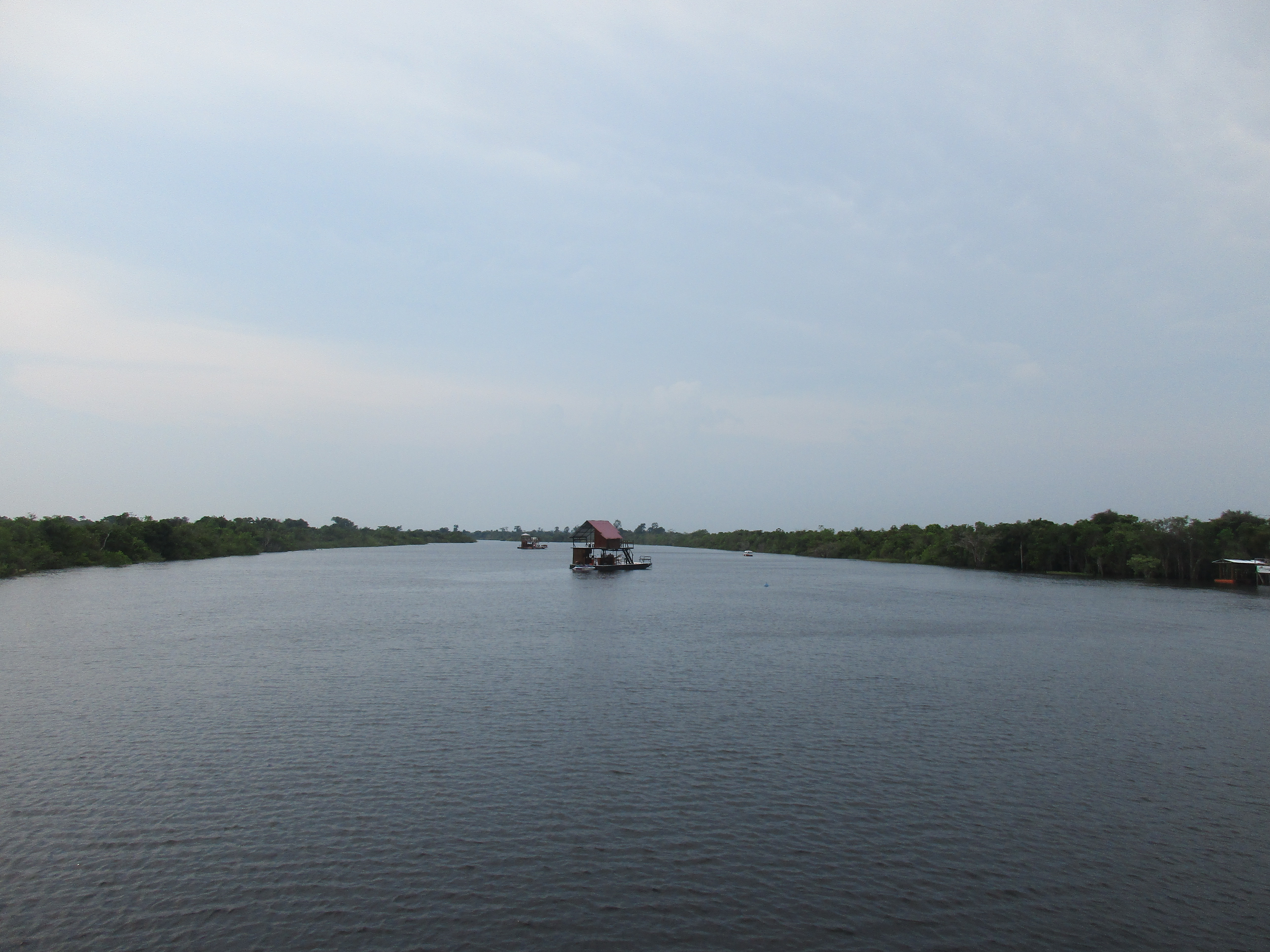 Santo Tomás, balneario de Iquitos..